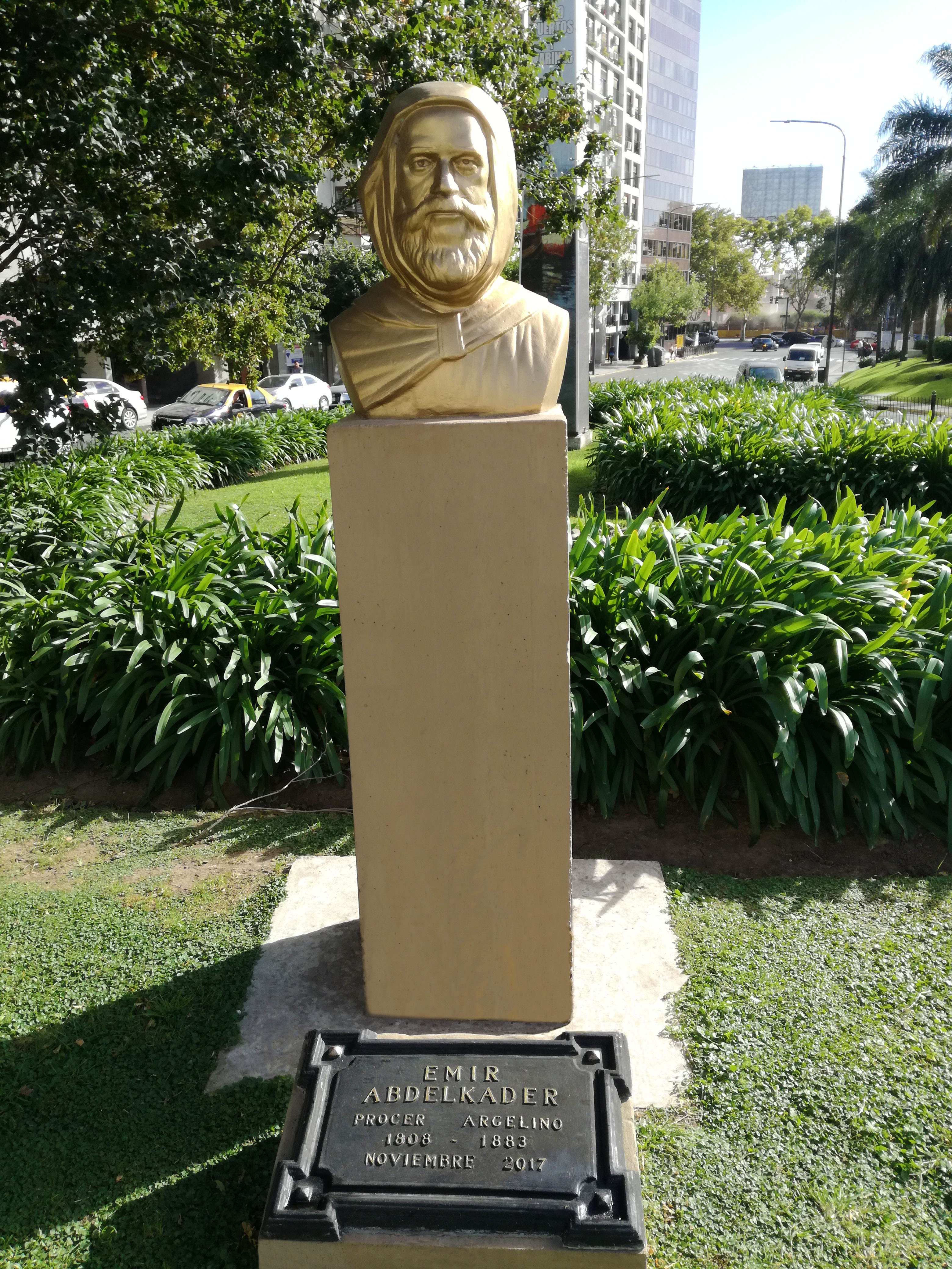 Busto del emir Abdelkader inaugurado en la ciudad de Buenos Aires en noviembre de 2017. Se encuentra en la plazoleta ubicada en Cerrito y Posadas frente al Hotel Four Seasons.